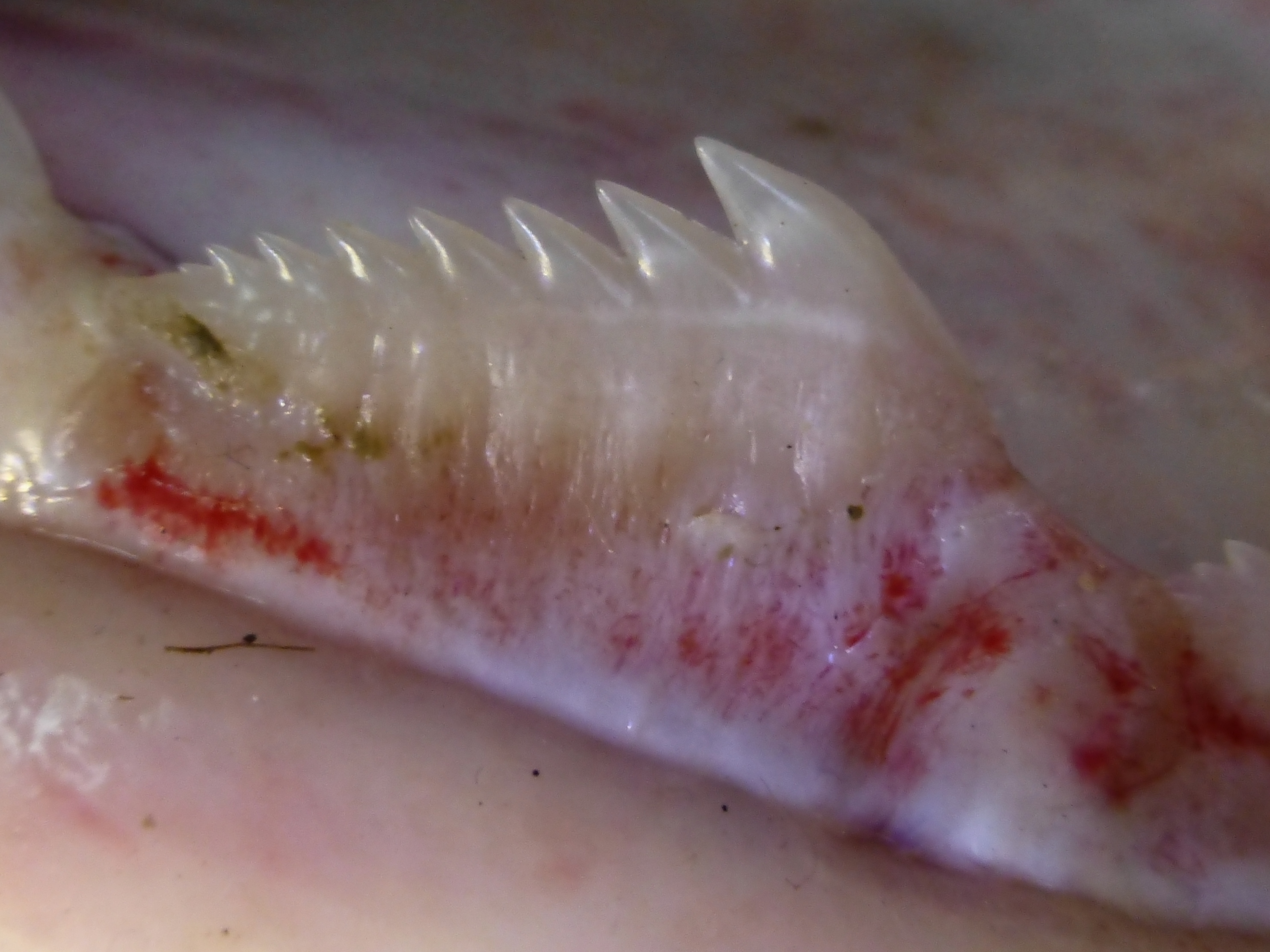 Camgöz köpekbalığı alt çene dişi. Kadıköy